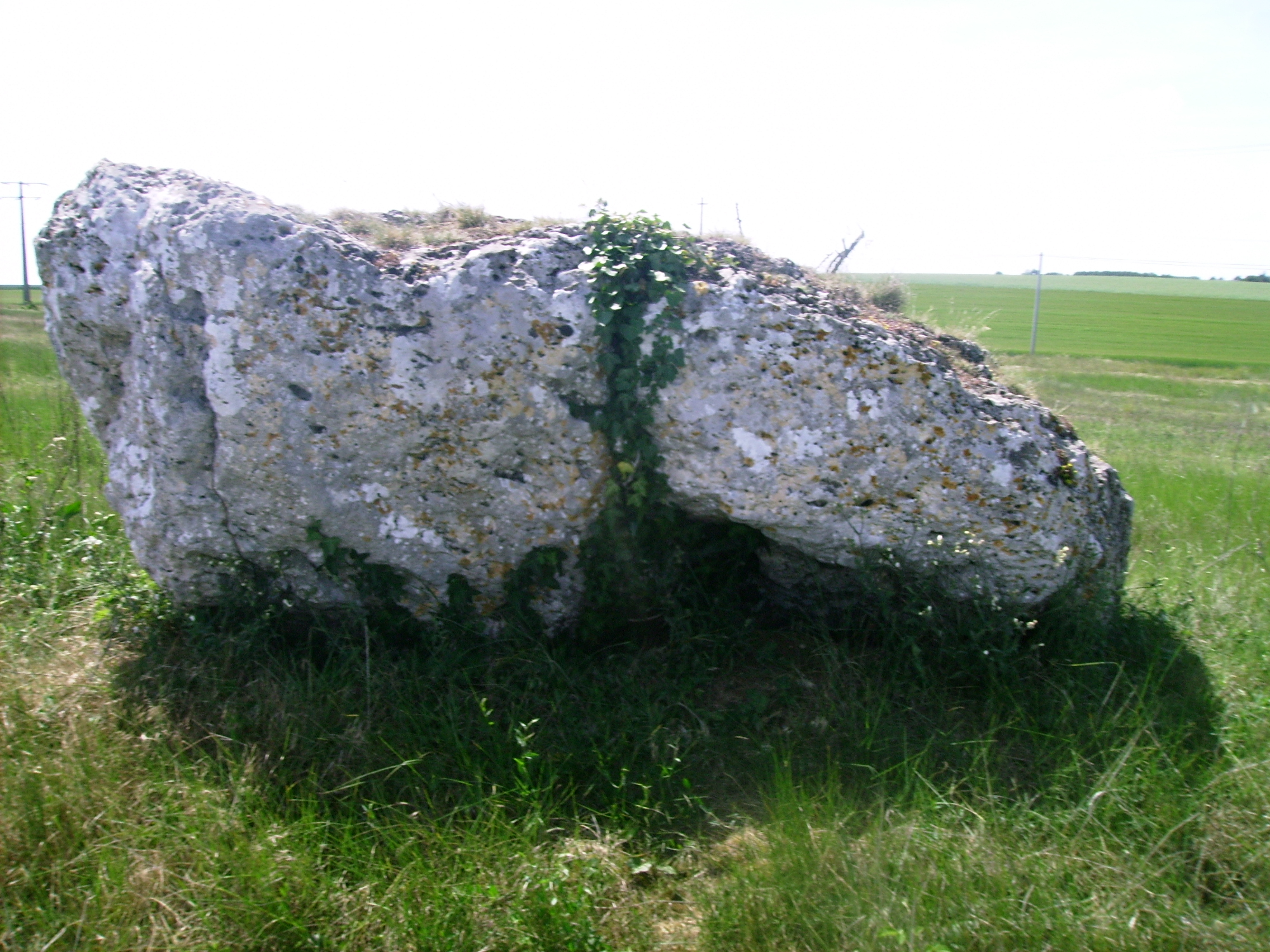 Dolmen du Bourg Neuf, à Tripleville (Loir-et-Cher, France)